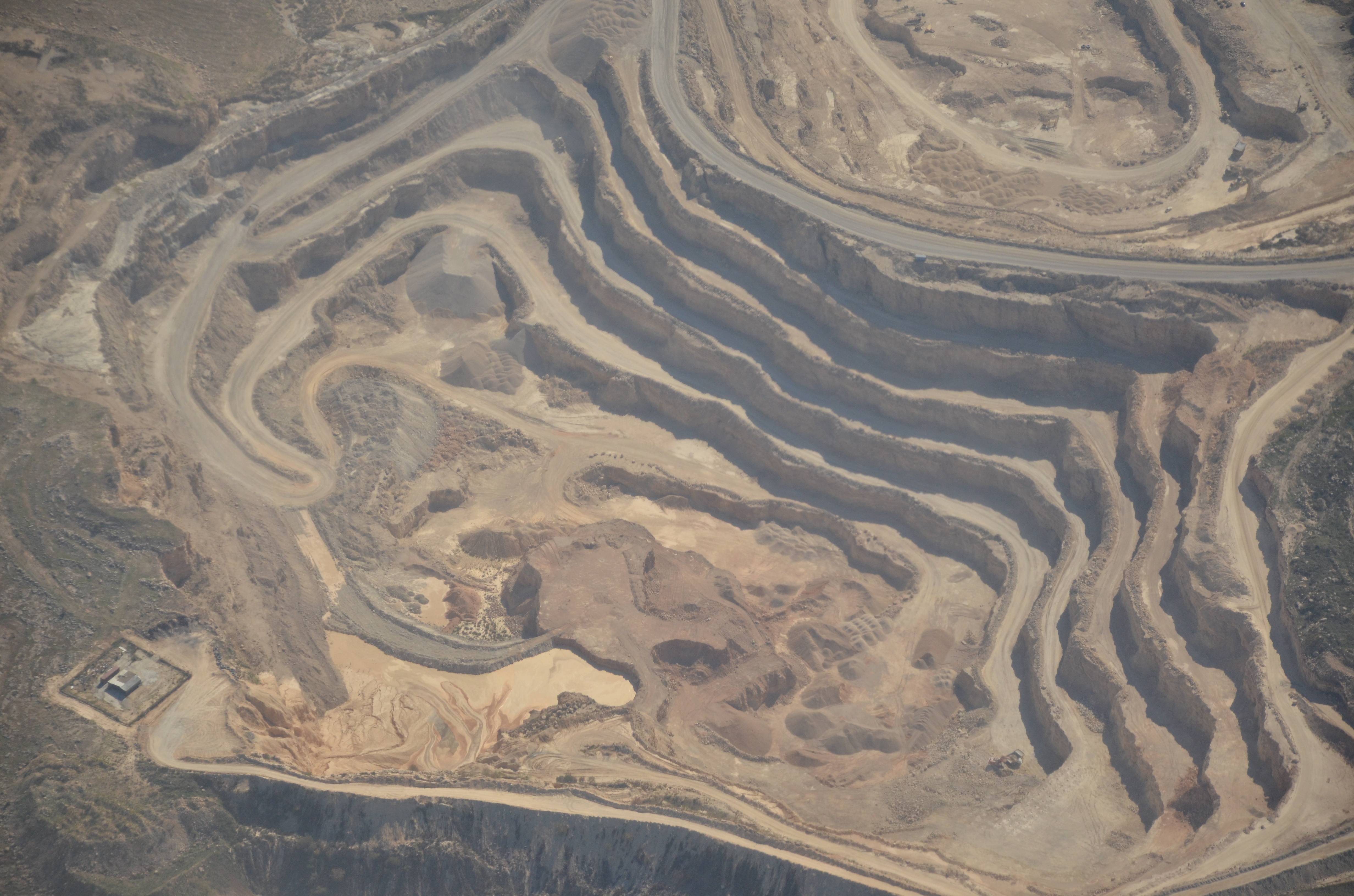 מחצבה מזרחית לשהם